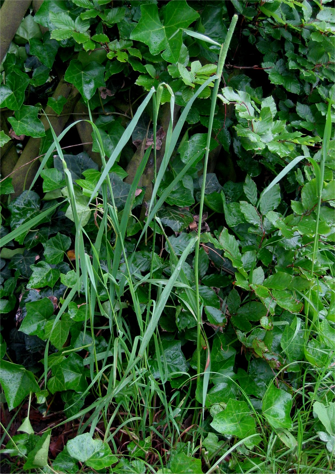 (Timoteegras) plant Phleum pratense subsp. pratense